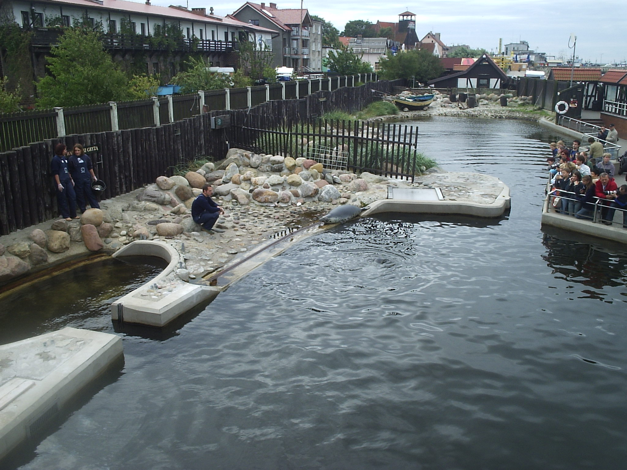 Fokarium - Stacja Morska Instytutu Oceanografii Uniwersytetu Gdańskiego w Helu.